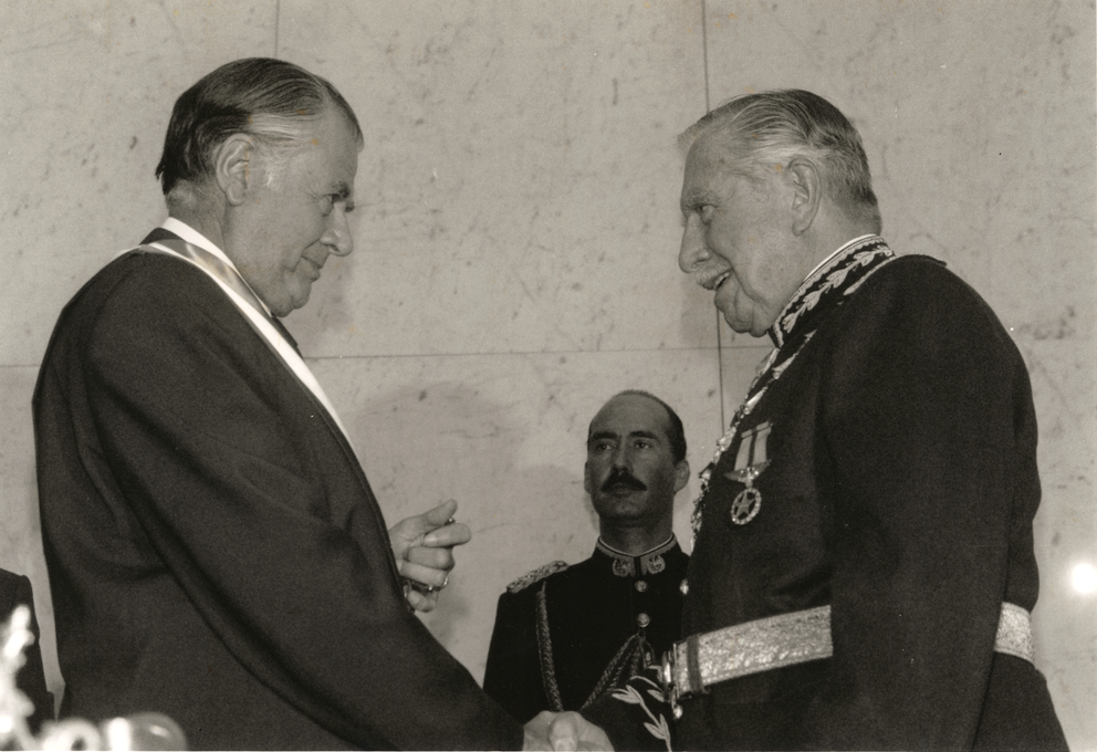 Retrato de S.E. el Presidente Patricio Aylwin Azócar y el General Pinochet, durante la ceremonia de transmisión de mando.